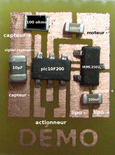 Implantation des composants du récepteur infra-rouge